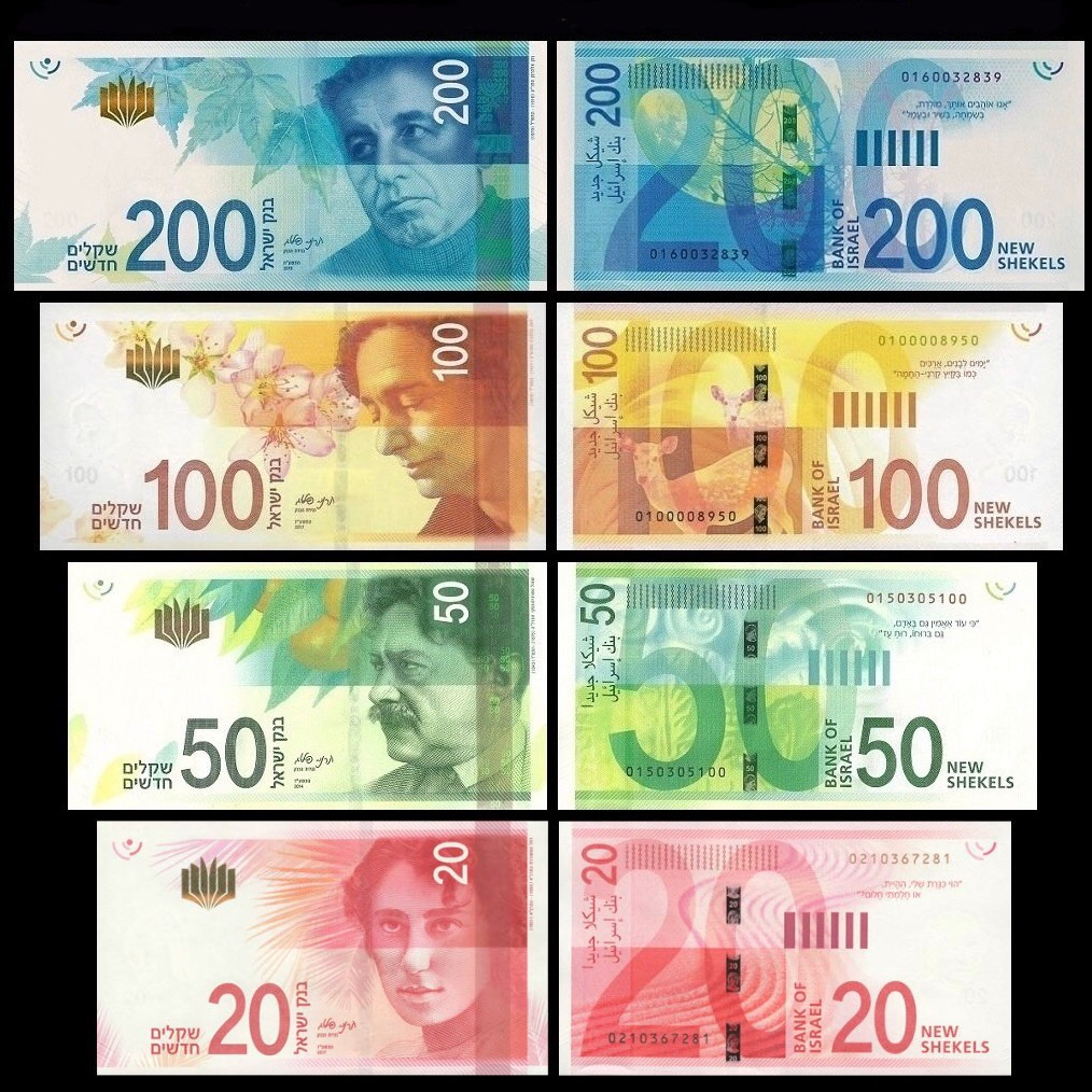 השטרות החדשים של ישראל